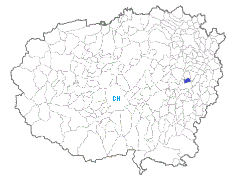 Posizione del comune nella provincia di Cuneo